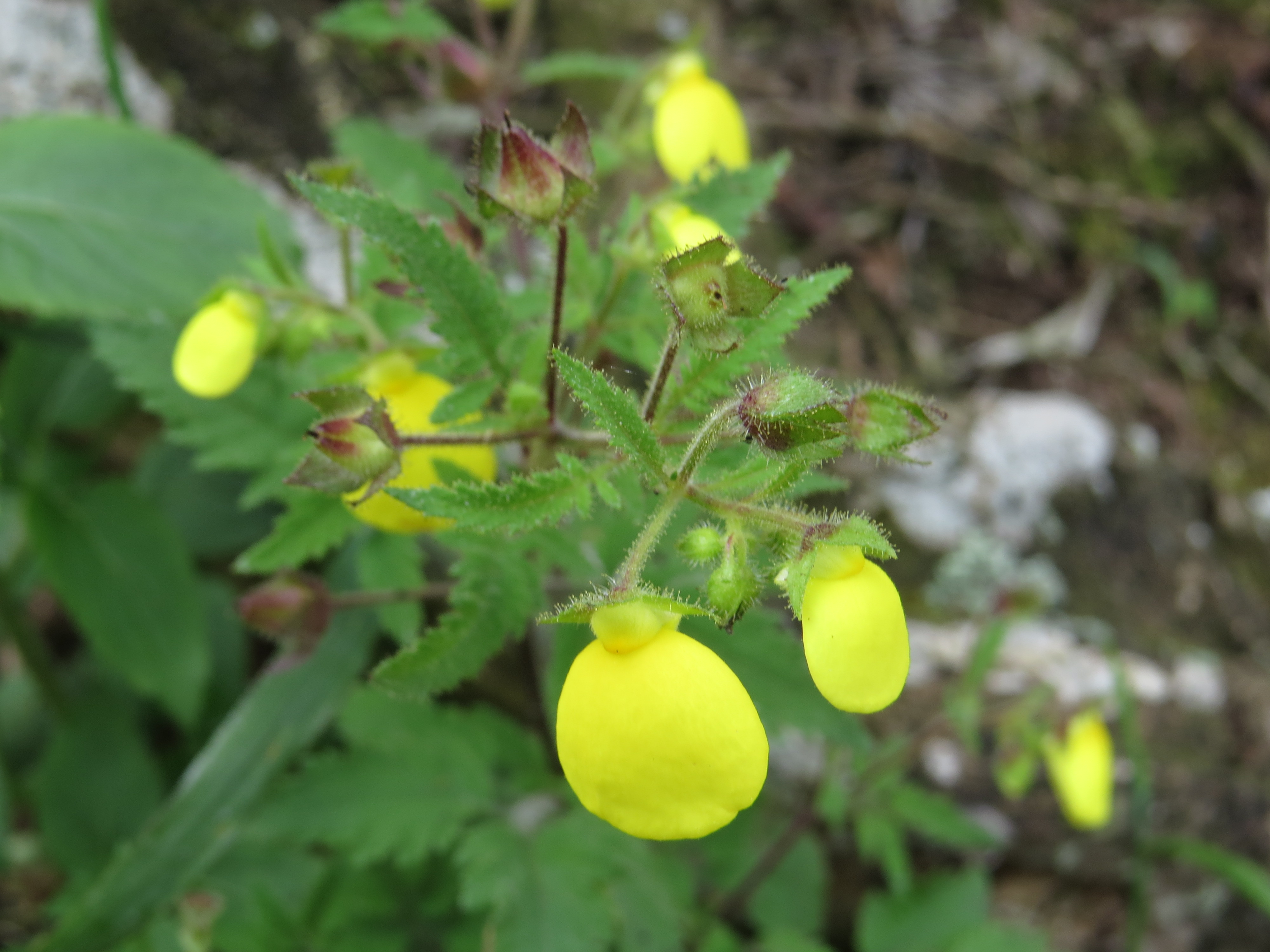 Photos taken at Mannavan Shola, Anamudi Shola National Park, Kerala during Munnar Butterfly Survey